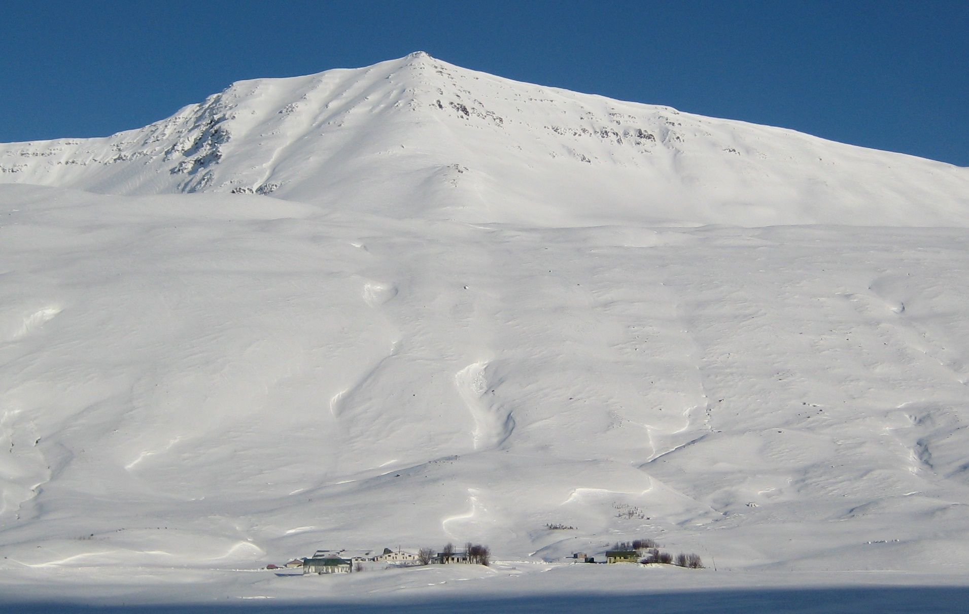 Syðrahvarf í Skíðadal, Hvarfsfjall í bak.